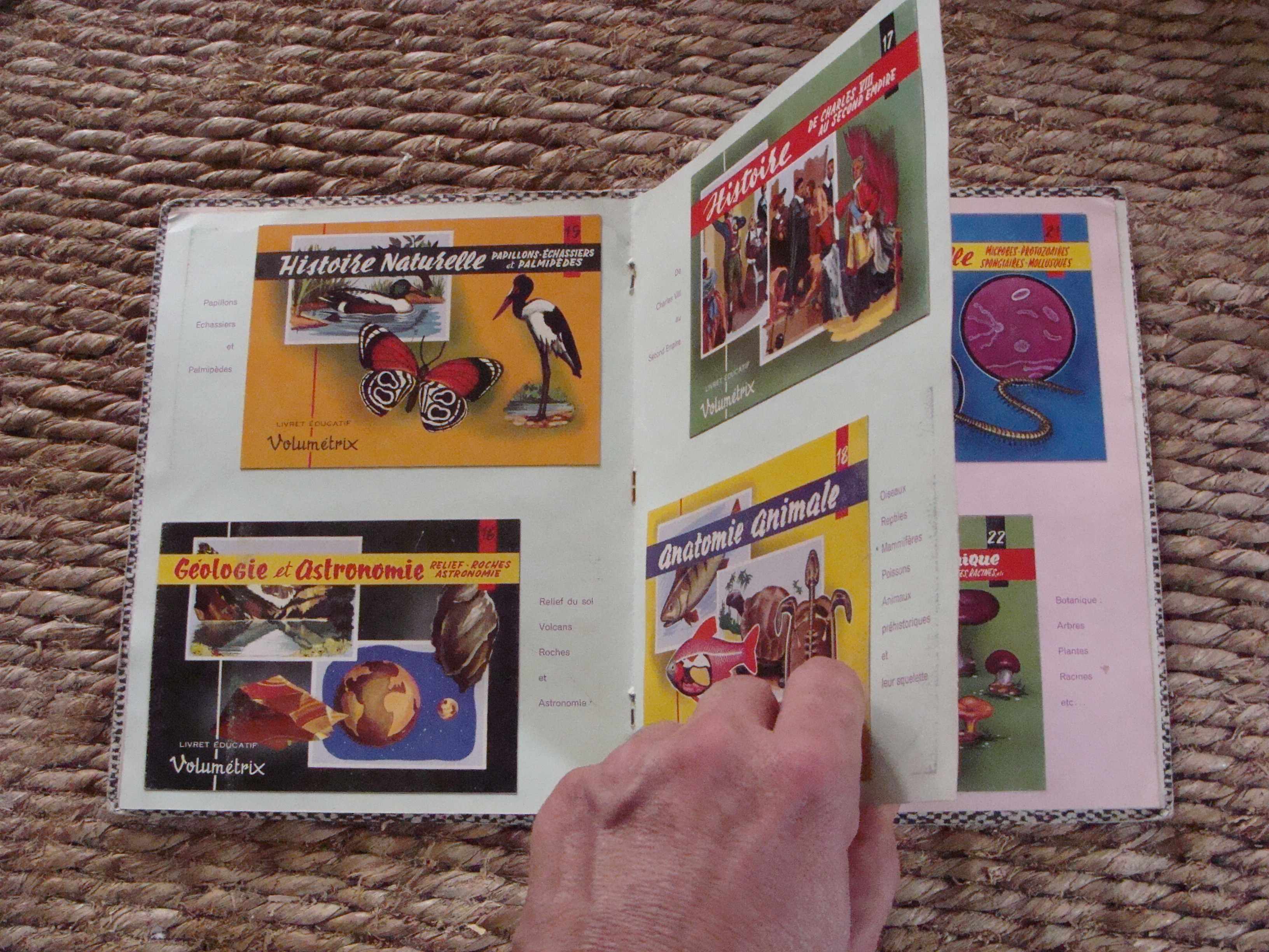 Ce Catalogue utilisé par les représentants des livrets Volumétrix pour prospecter les librairies en 1961